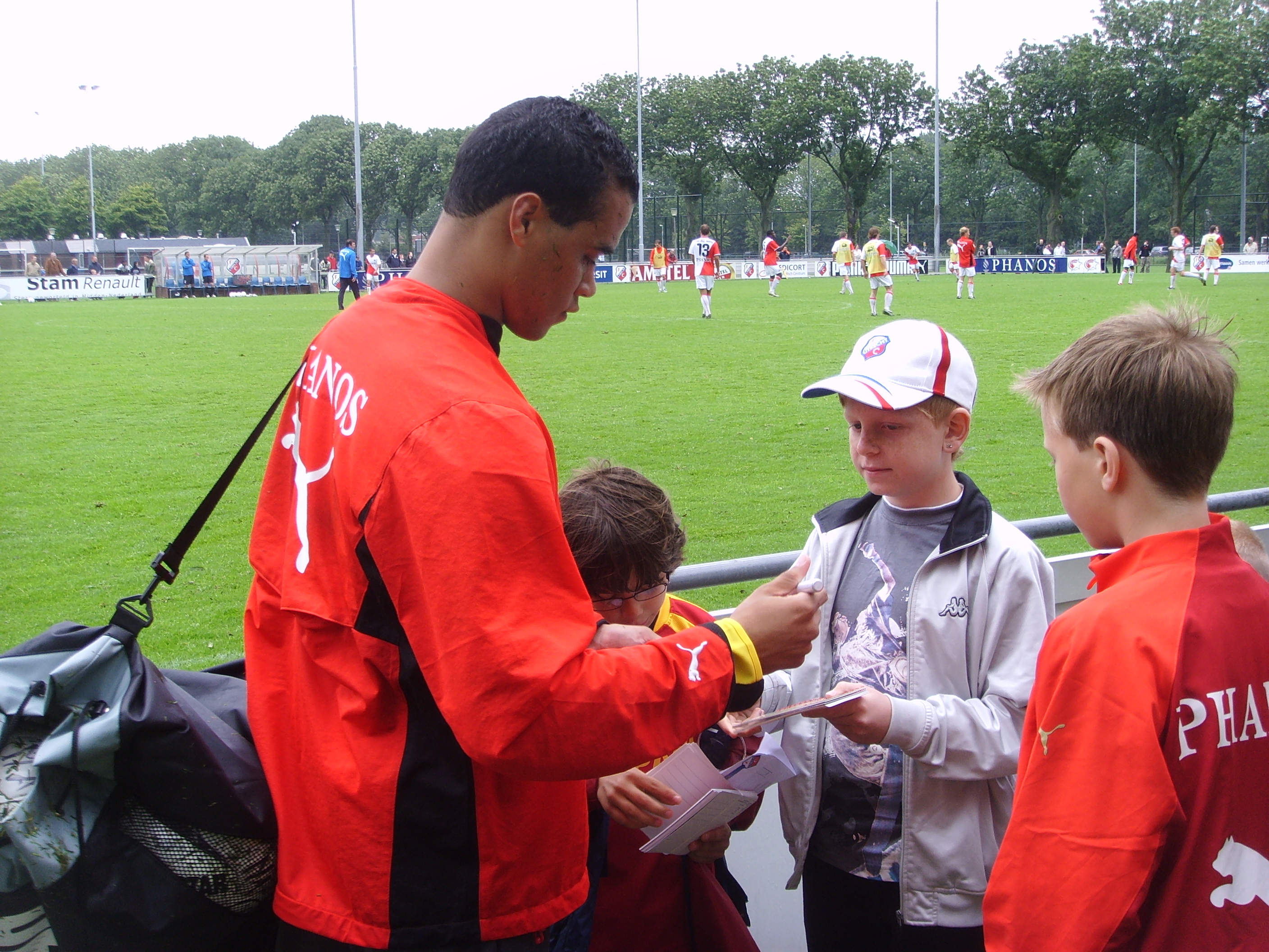 Michel Vorm deelt handtekeningen uit na de eerste training van het seizoen 2008-2009 van FC Utrecht